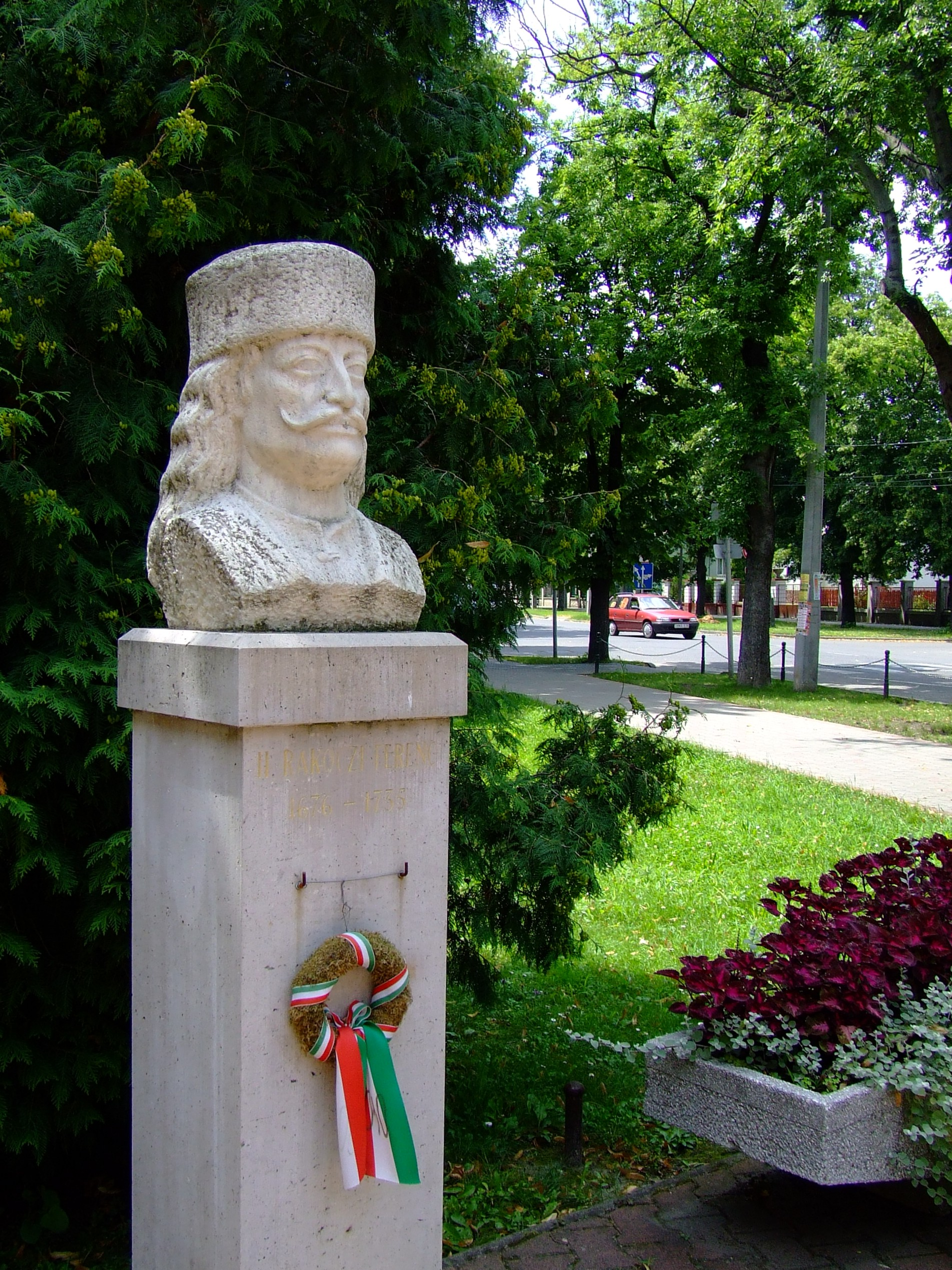 II. Rákóczi Ferenc mellszobra Kiskunhalason, a róla elnevezett szakközépiskola épülete előtt. Papachristos Andreas (*1937) görög származású magyar szobrászművész alkotása (1976)